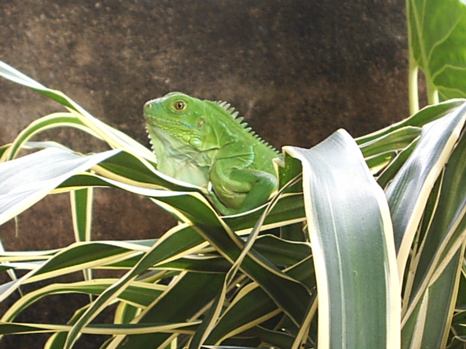 Iguana